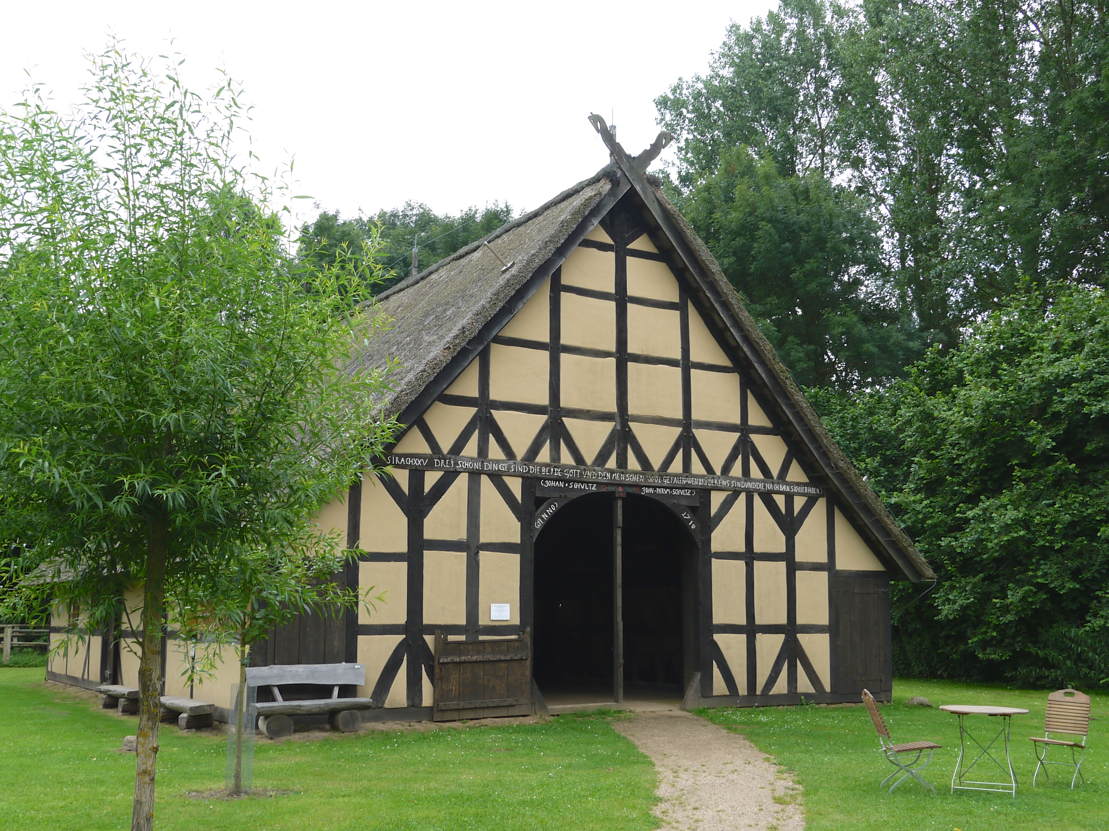 Rundlingsmuseum Lübeln - Parum Schultze Haus: Zweiständerhaus von 1710 aus Süthen bei Küsten, erbaut von dem Bauernchronisten Johann Parum Schultze